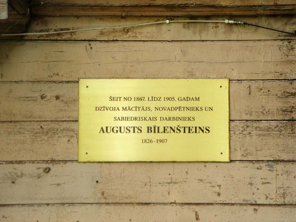 Erinnerungstafel am ehemaligen ev.-luth. Pastorat in Doblen/Dobele, Lettland